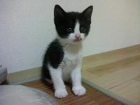 어린 고양이, 뽀송이